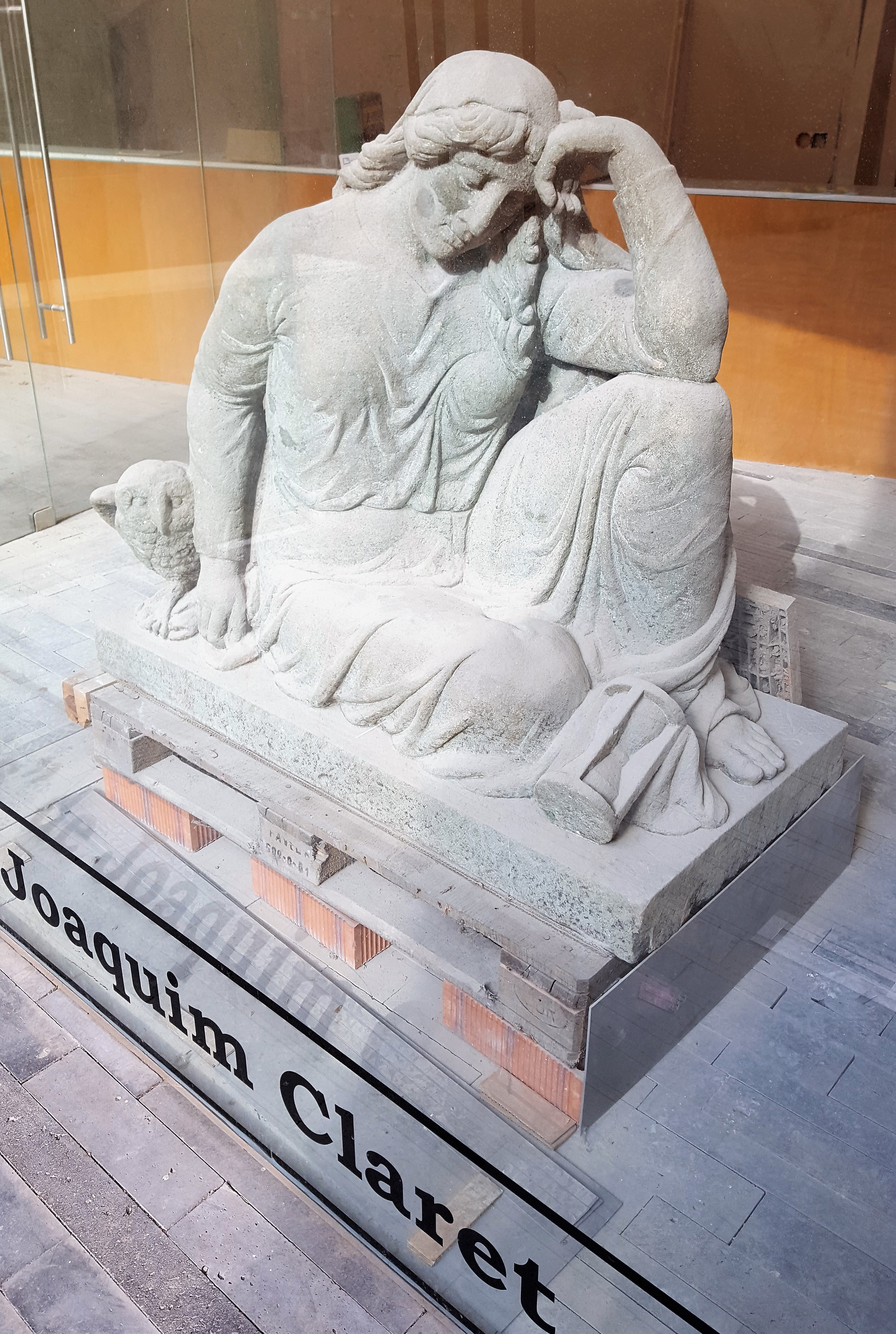 Joaquim Claret: Repos (Ruhe; Originalfigur, für die Öffentlichkeit ausgestellt im Ortszentrum von Camprodon neben dem Haus Cal Marquès, Carrer de Catalunya)